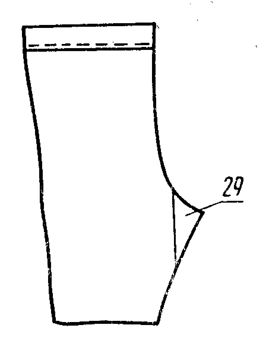 Изображение из ГОСТ 22977-89 (СТ СЭВ 6484-88) — Детали швейных изделий. Термины и определения.